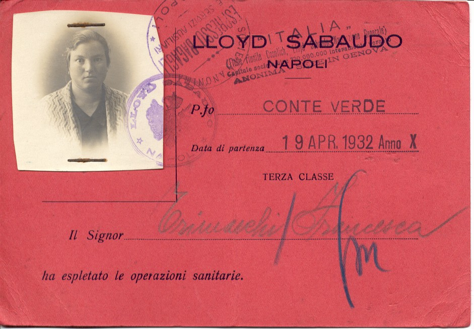 Pasaje de la compañía marítima Lloyd Sabaudo, para el viaje Génova-Buenos Aires, 1932.